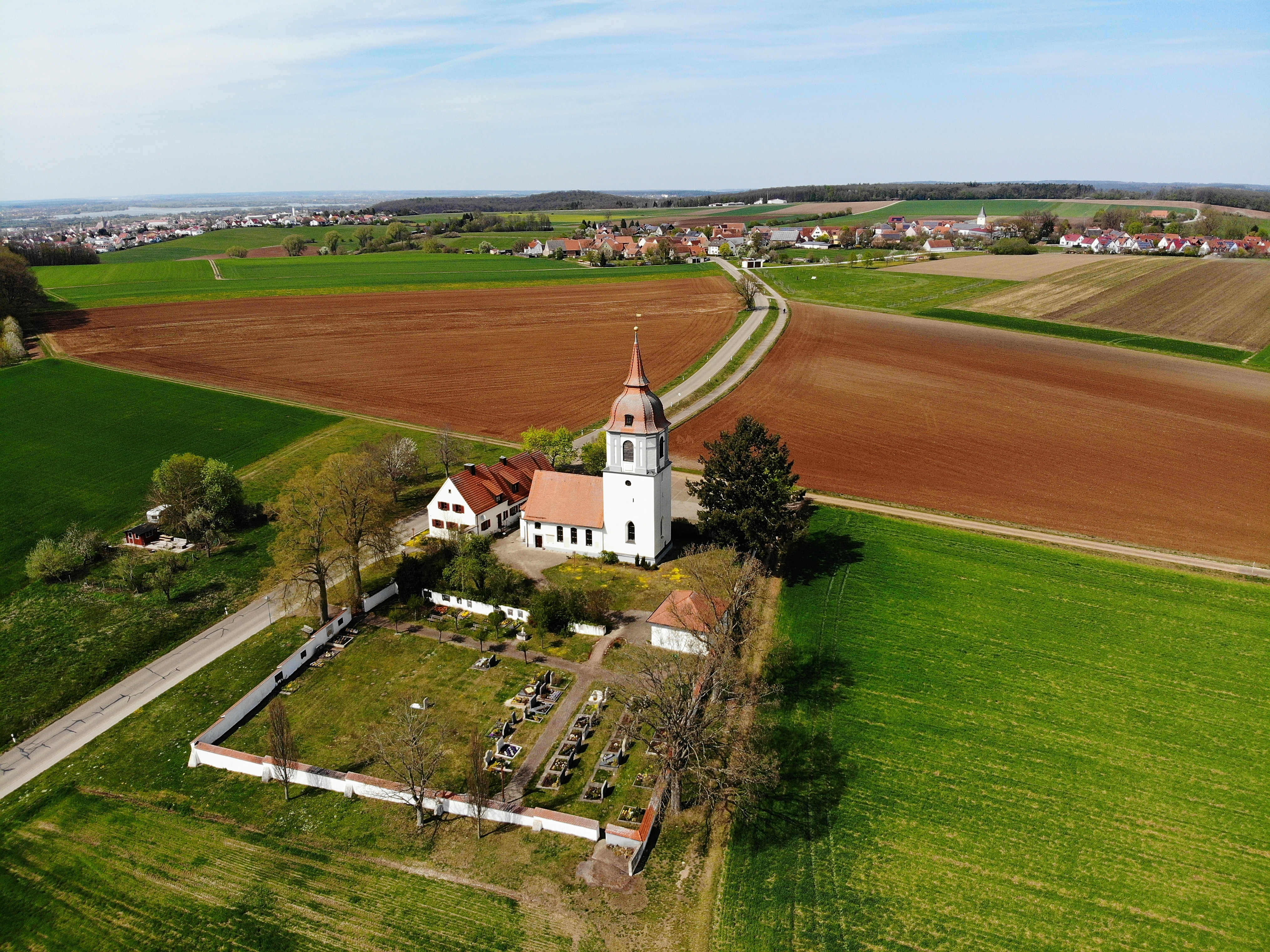 St.-Michaels-Kirche (Unterasbach) von Süden Luftaufnahme (2020)